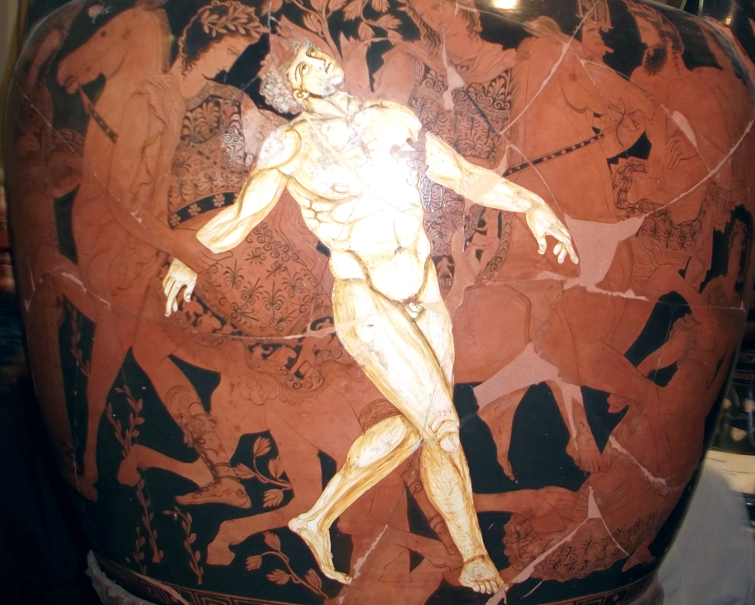 Particolare del Vaso di Talos